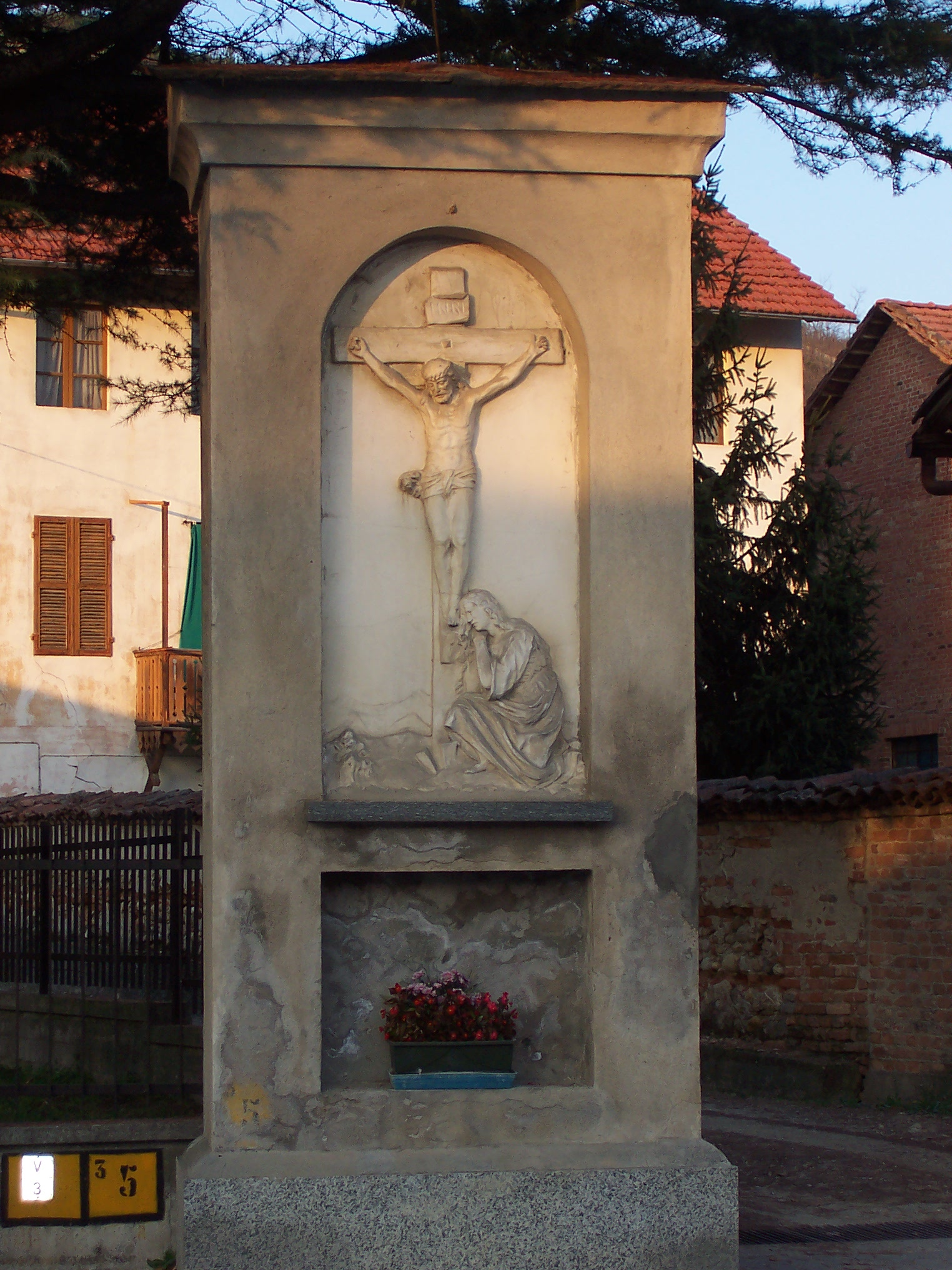 Corneliano d'Alba - Pilone dedicato a Santa Maria Madalena